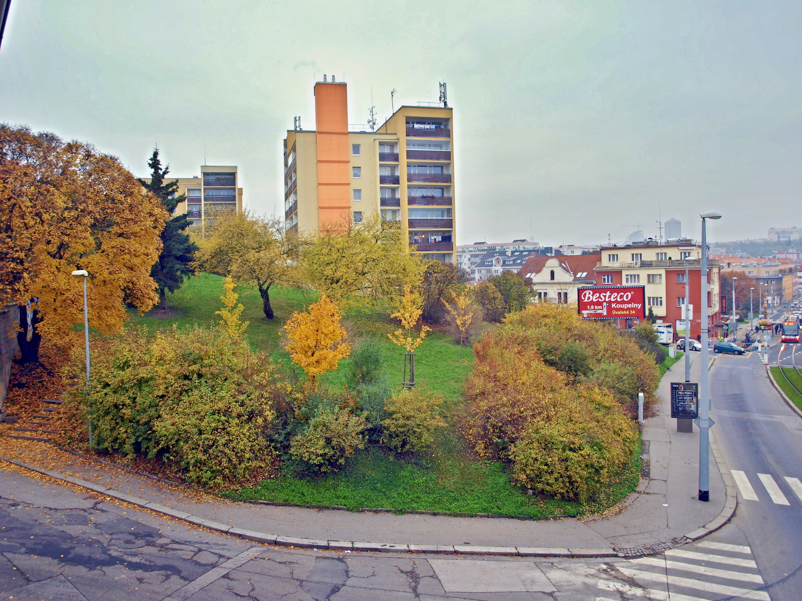 Ulice Průběžná v Praze Strašnicích